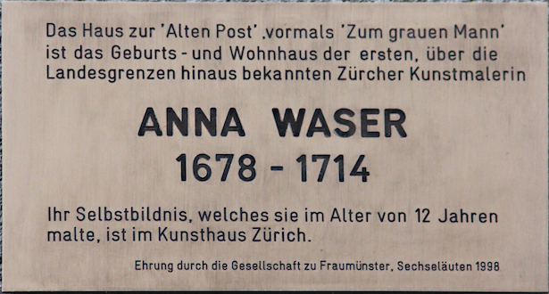 Gedenktafel von Anna Waser am Haus «Zur Alten Post», Müntergasse 19 in Zürich